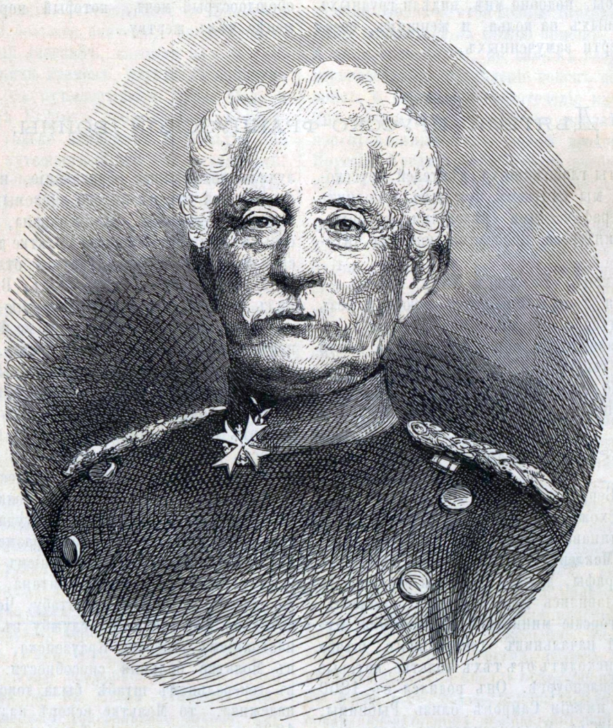 Штейнмец, Карл Фридрих фон